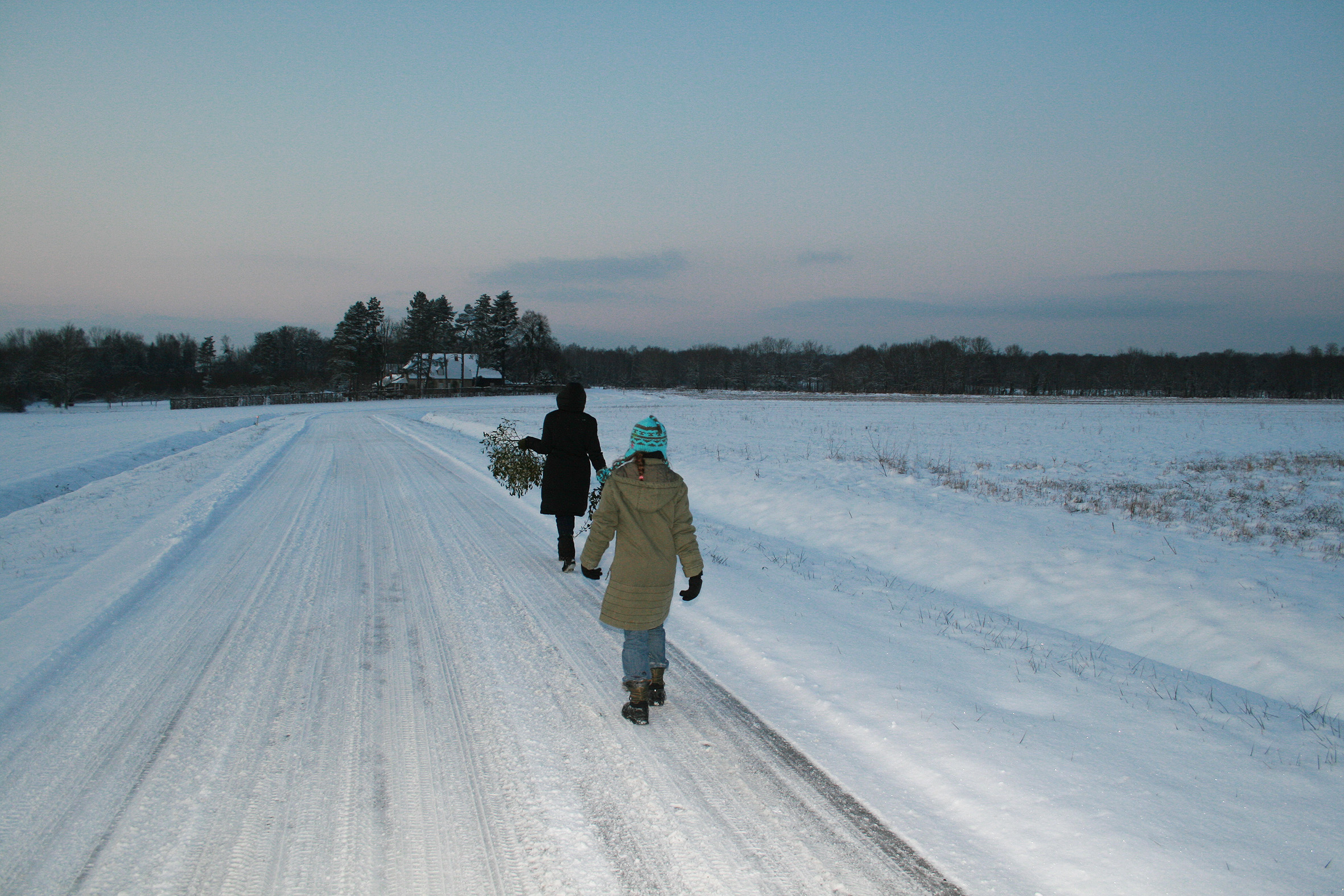 Photo prise depuis la route de Seligney (:fr:Villers-Robert ), au fond, la maison ou est la stèle dédiée à Marcel Aymé